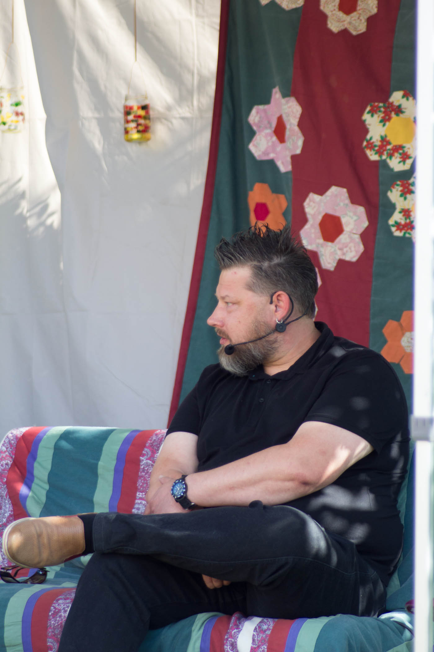 Indrek Hargla 2015. aasta Arvamusfestivalil Rahva Raamatu aias.